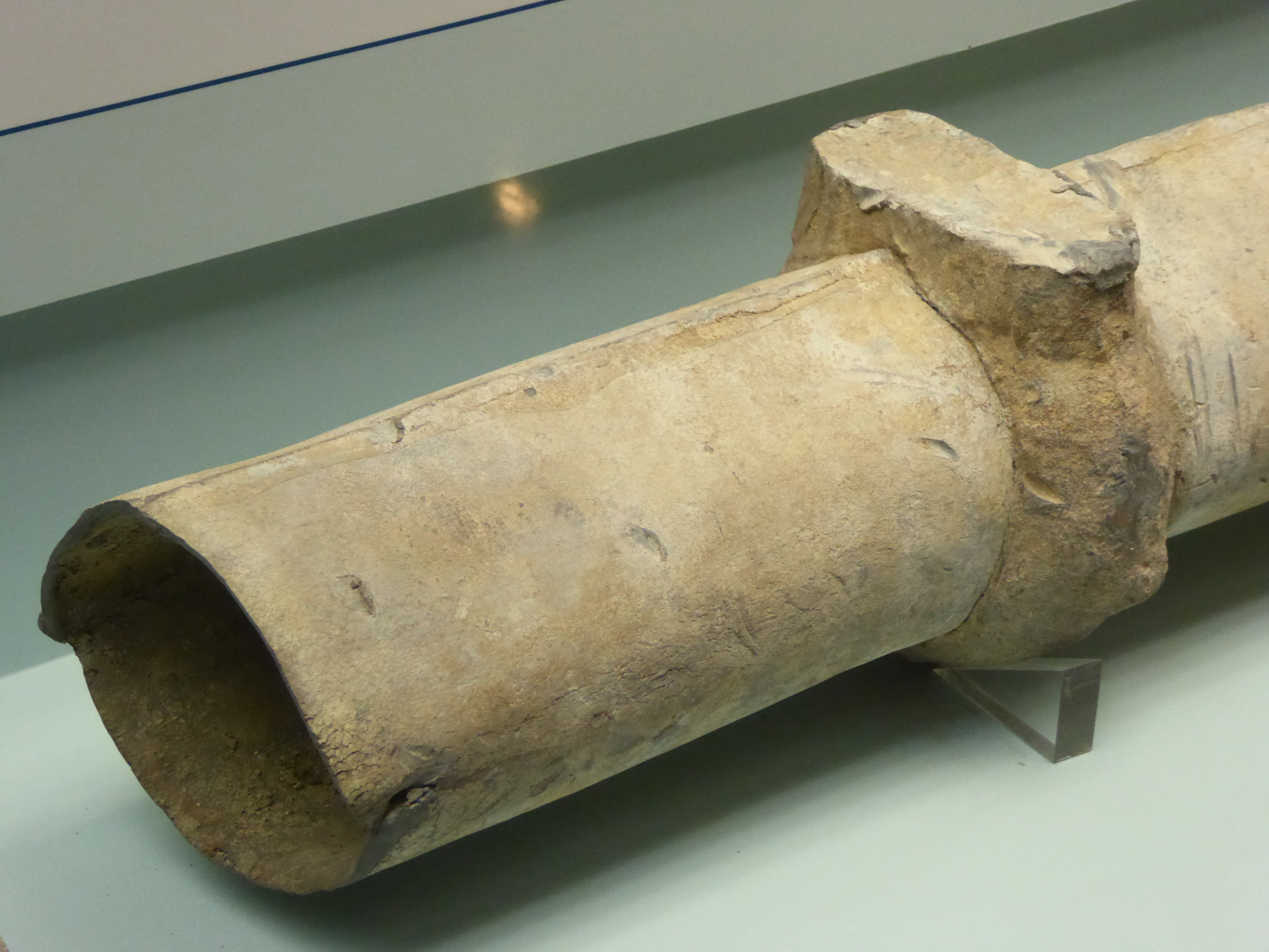 Tubería